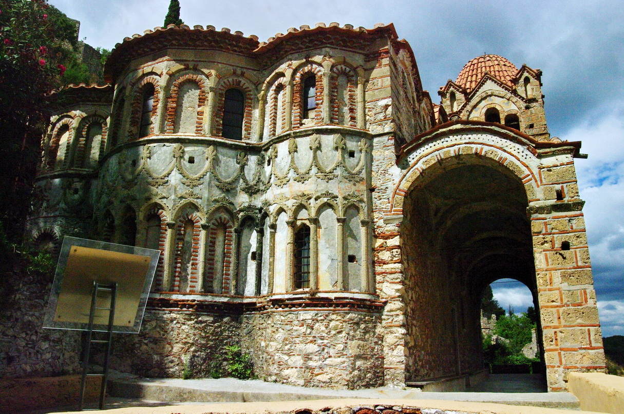 Kirche im Kloster Pantanassa, Unterstadt Mystras